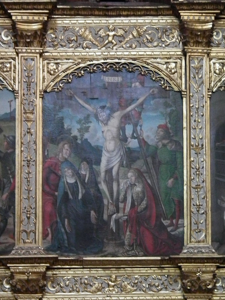 Details on the Retablo di San Miguel, Catedral de Santa María, Astorga, León, Spain